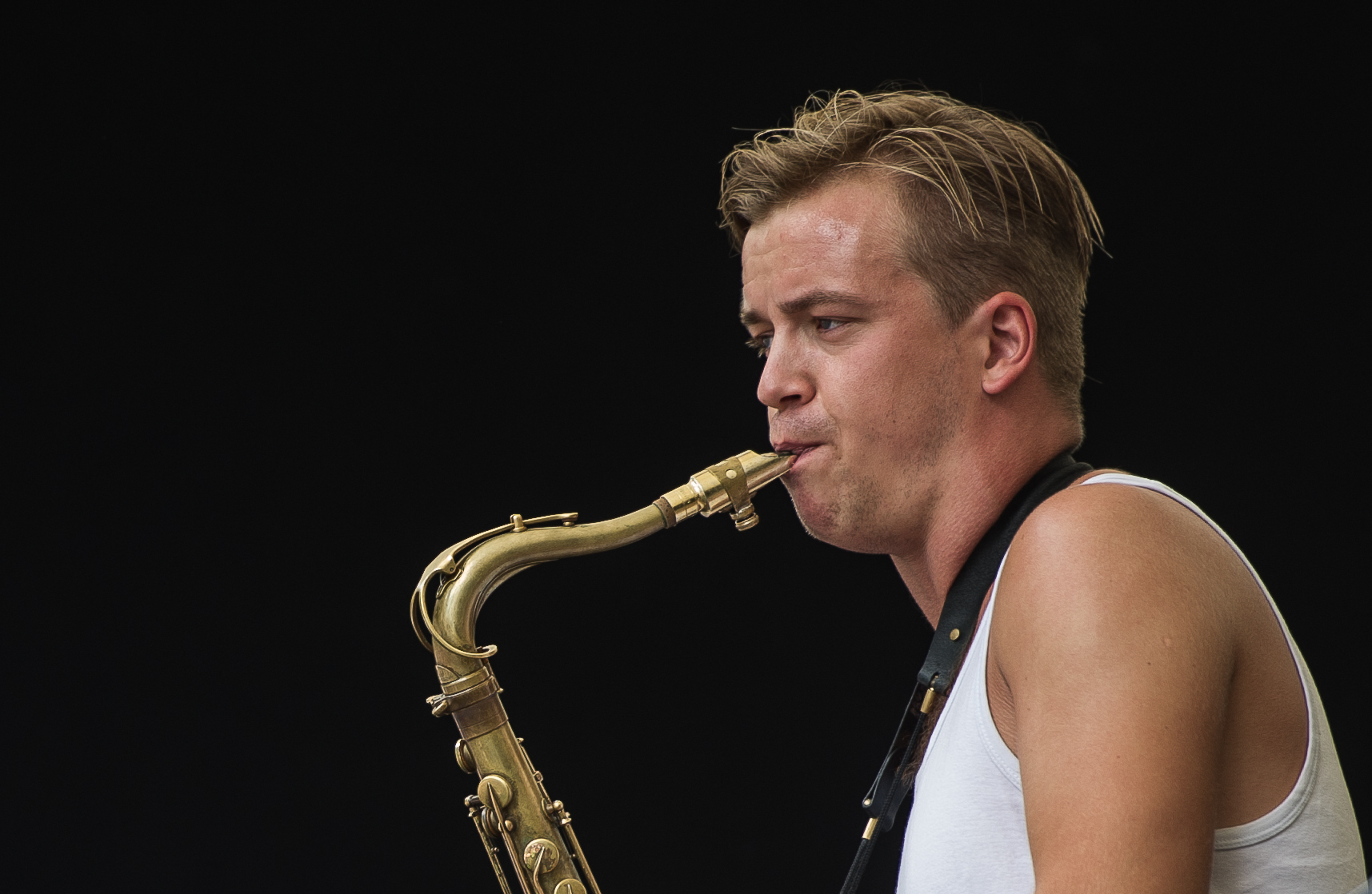 Marius Neset @ Jazz im Museumspark, Frankfurt 04.08.2013